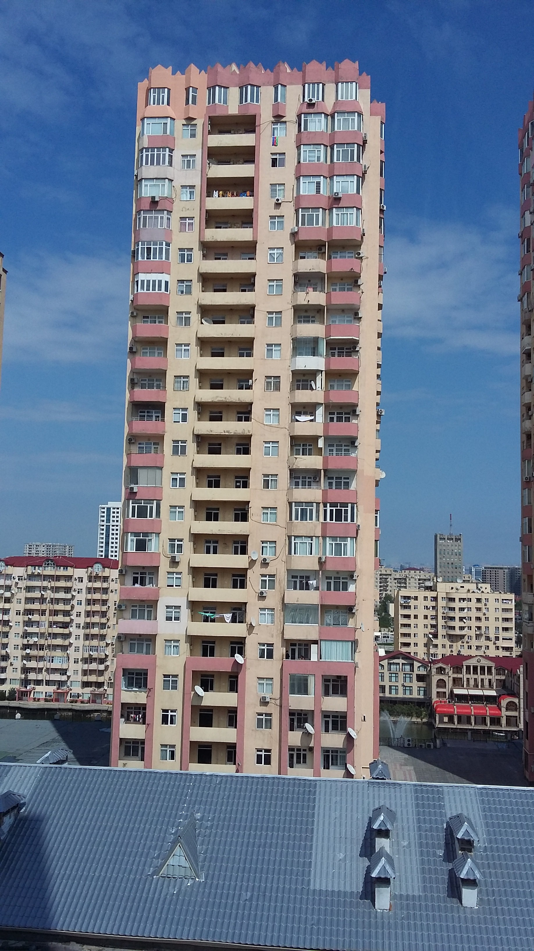 Bakıda Üç tac binaları